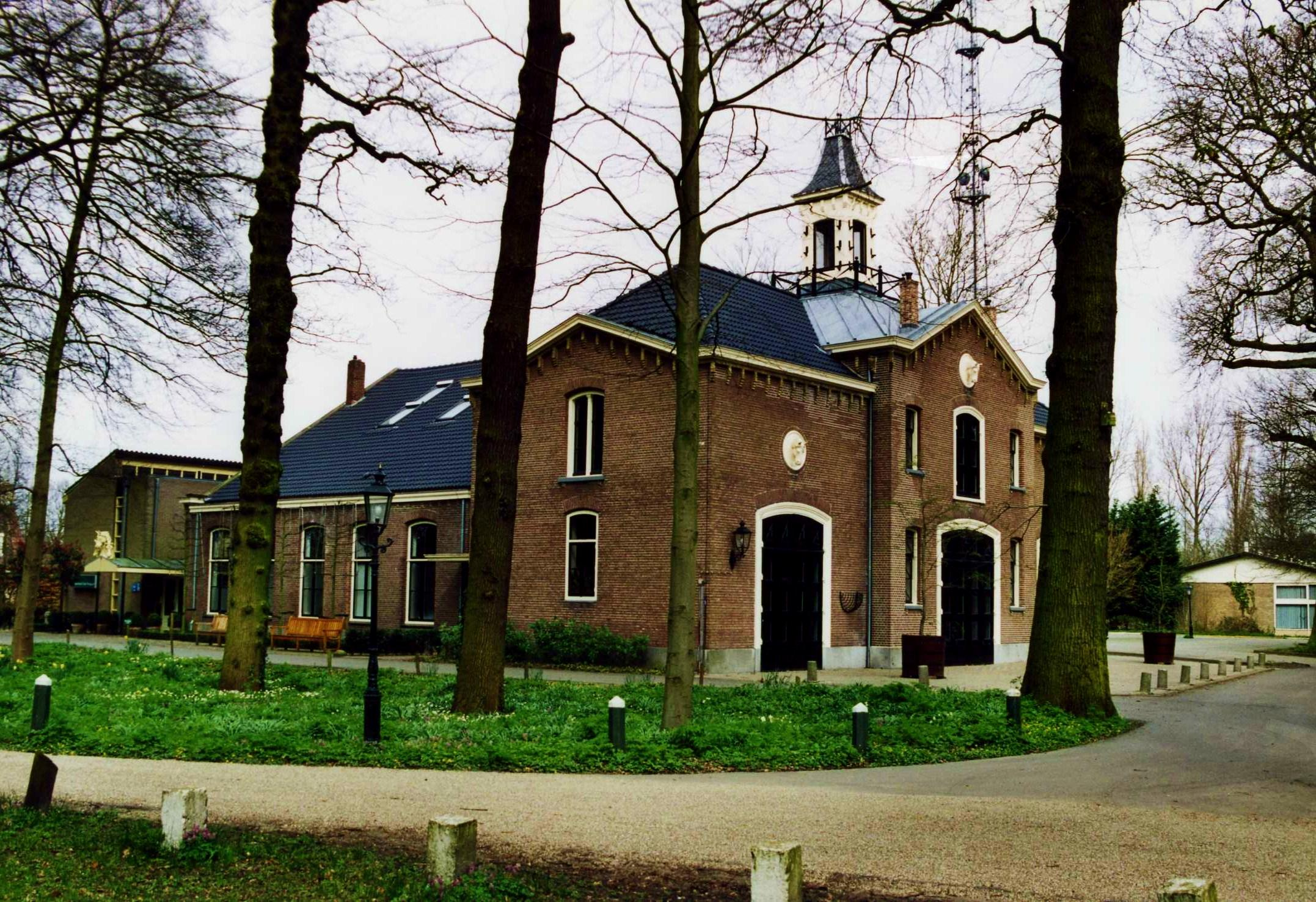 Het koetshuis van kasteel Oud-Poelgeest te Oegstgeest.